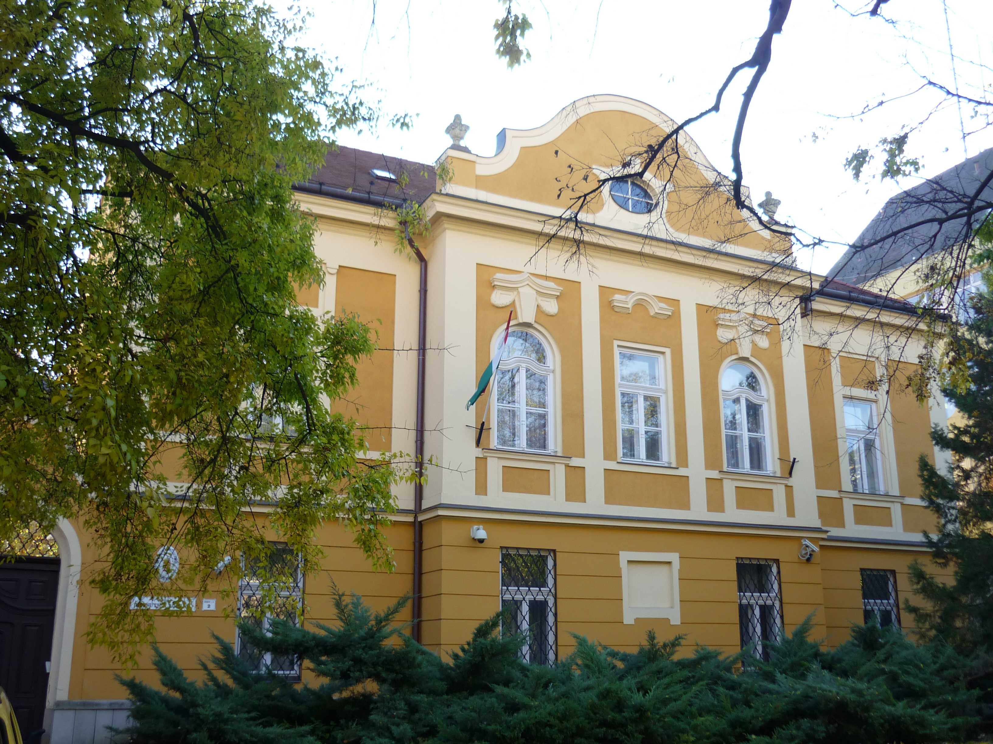 A Nemzetbiztonsági Hivatal Heves megyei kirendeltsége. - Eger, Kossuth Lajos utca 2